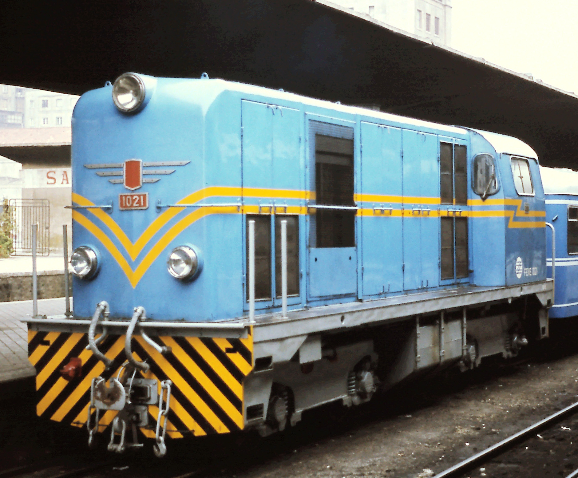 Ferrocarriles de Vía Estrecha locomotief 1021 op 25 september 1977 te Santander.